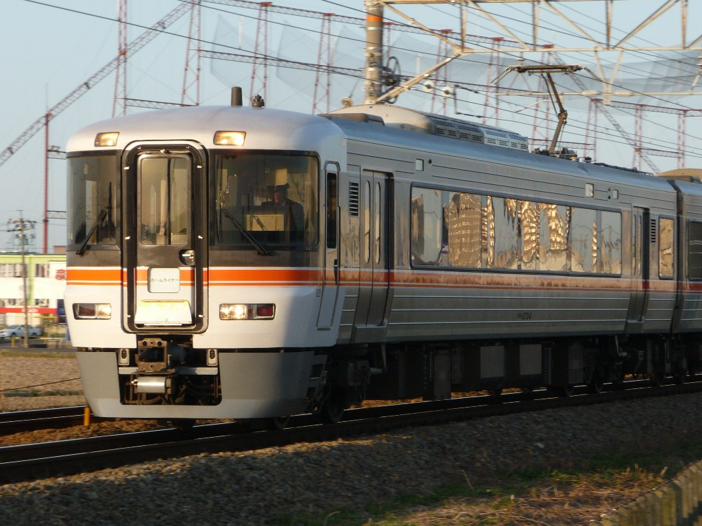 373系が充当されるホームライナー静岡。磐田市にて撮影。